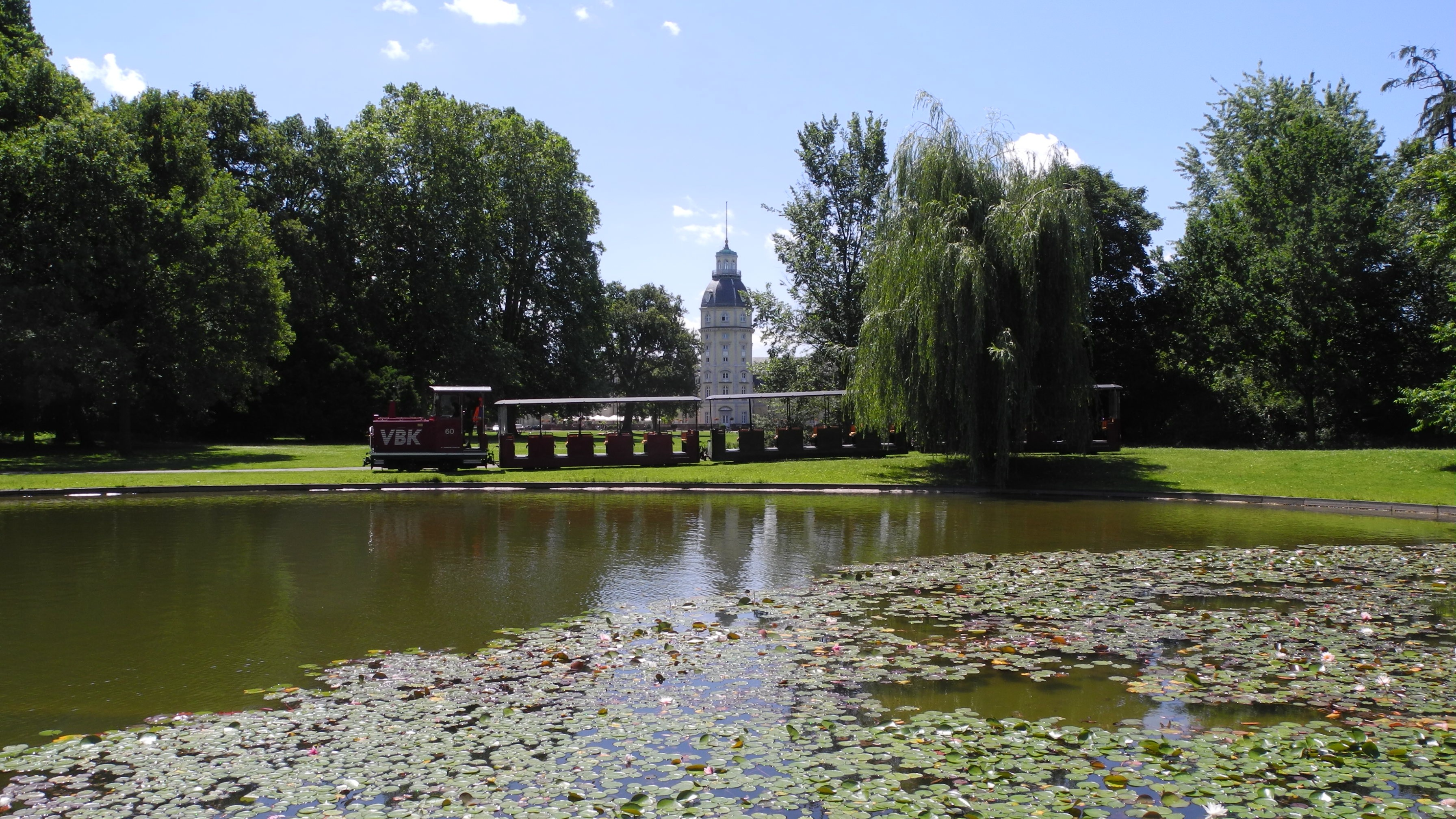 Karlsruhe - Schlossgarten